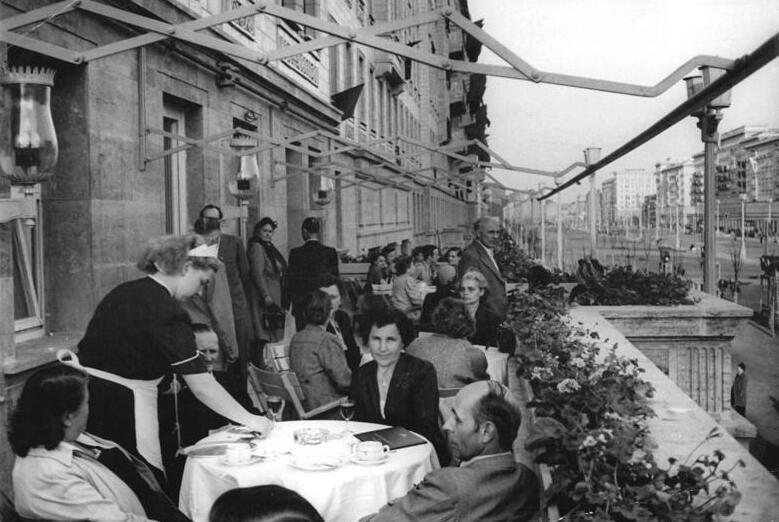 Berlin, Café "Warschau", Terrasse 1. Mai 1953 - Kampftag der Werktätigen für Frieden, Einheit, Demokratie und Sozialismus UBz: Viele Berliner besuchten am Nachmittag des 1. Mai das HO Cafe` "Warschau" im Block D-Nord in der Stalinallee, das an diesem Tage eröffnet wurde - Blick auf die Terrasse des Cafe`s. Zentralbild-Quaschinsky Ne-Wi. 1.5.1953